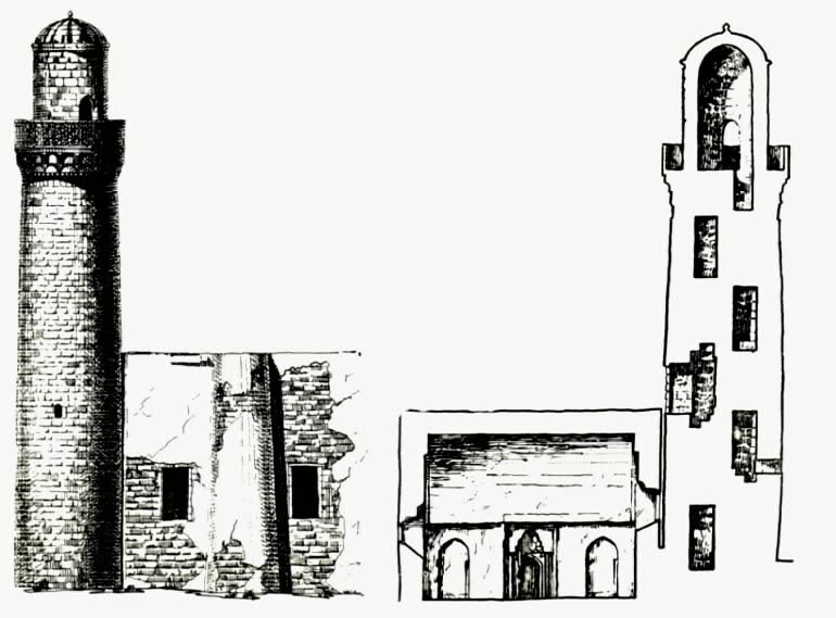 Sınıqqala məscidinin kəsiyi